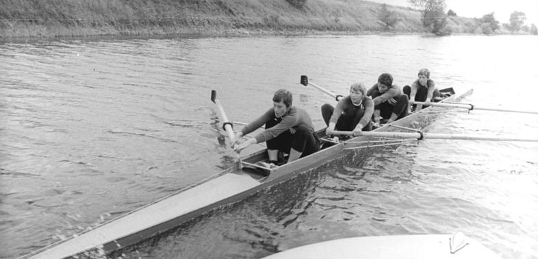 Neisser, Noack, Skorupski, Sandig Zum Beitrag: Rudertalente zwischen Frühstück und Gänsebraten gefunden Wird der Elster-Saale-Kanal erneut zum Goldwasser? ADN-ZB Kluge-21.8.1979-ha. Das ist die Trainingsstrecke der Leipziger DhfK-Ruderer auf dem Elster-Saale-Kanal. Im Vordergrund v. links im Frauen-Vierer mit Steuermann: Kersten Neisser, Angelika Noack, Ute Skorupski, Marita Sandig und (dahinter verdeckt) Steuerfrau Kirsten Wenzel. Diese Mannschaft hat Medaillen-Ambitionen für die bevorstehenden großen internationalen Aufgaben. (Beachten Sie hierzu auch Bild 183-U0821-300 -301 und -303 N) Abgebildete Personen: Noack, Angelika: Rudersportlerin, DDR Sandig, Marita: Rudersportlerin, DDR Neisser, Kersten: Rudersportlerin, DDR Skorupski, Ute: Rudersportlerin, DDR